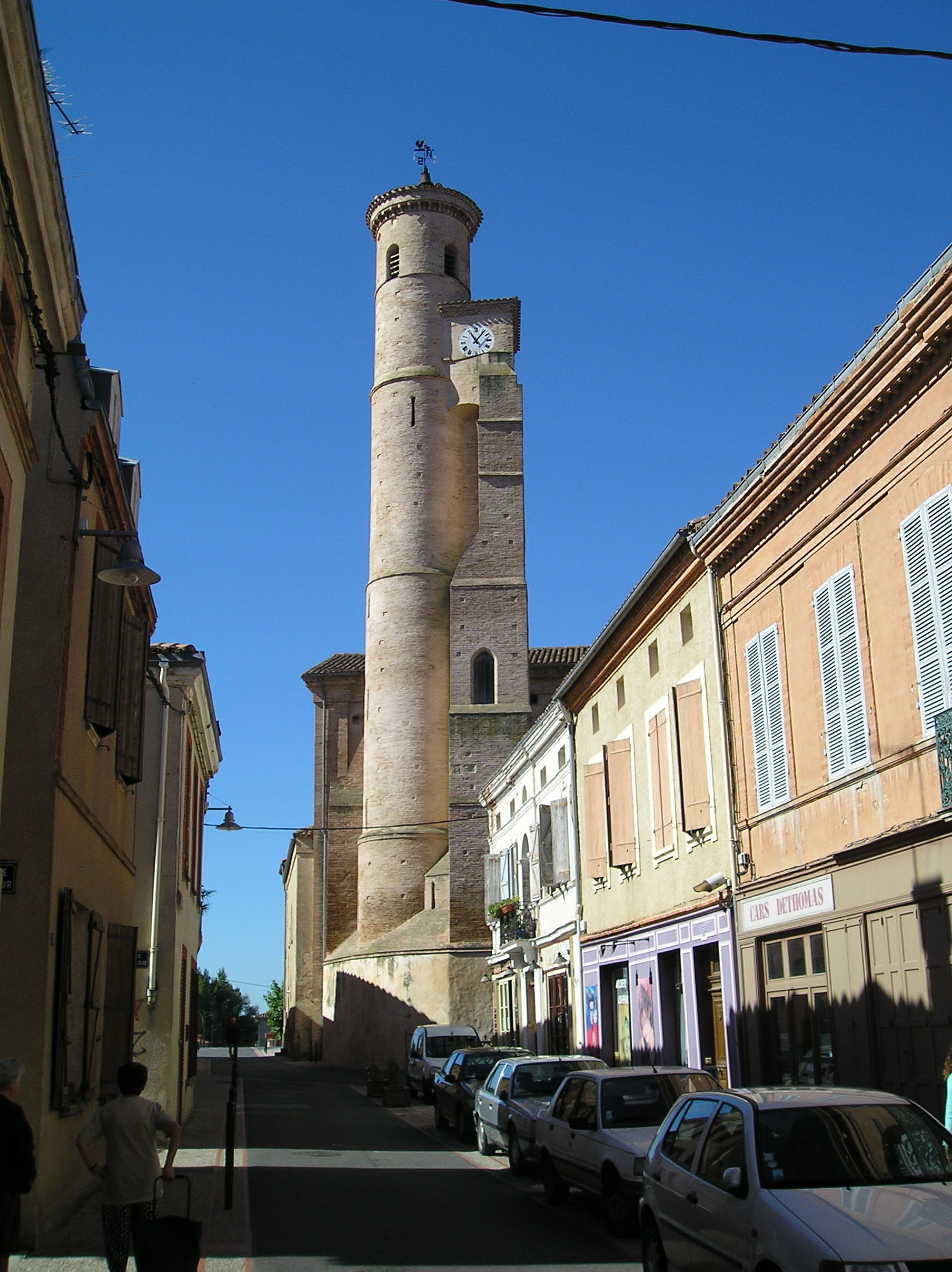 L'Isle-Jourdain (Gers, Midi-Pyrénées, France) : La rue de la République et le clocher de la Collégiale Saint-Martin.